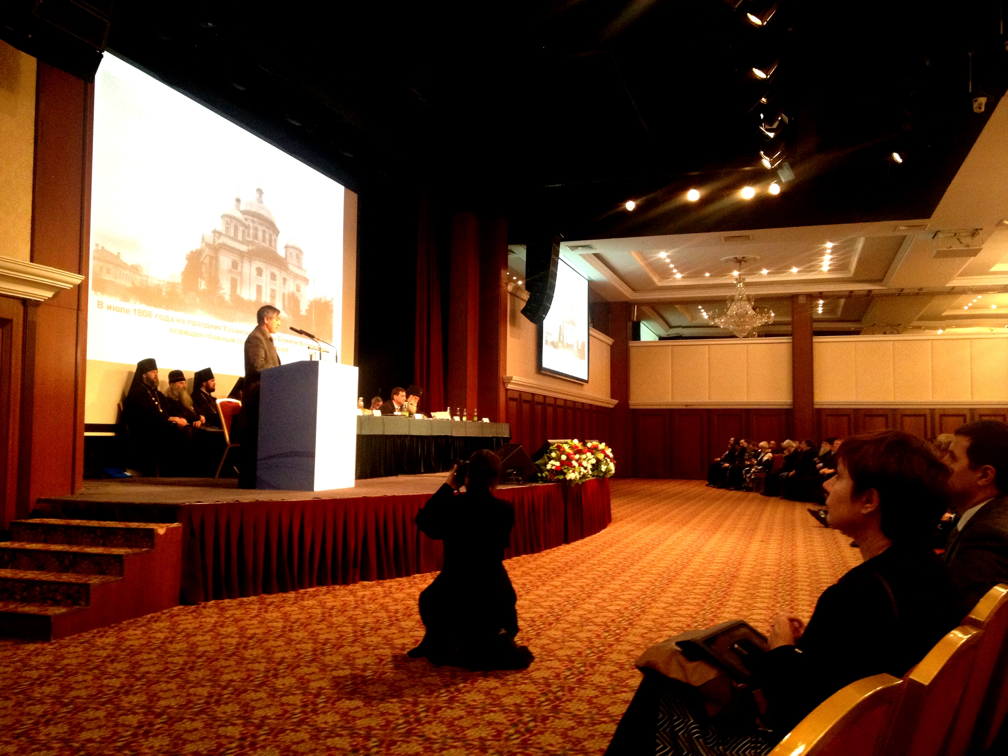 Выступление историка-краеведа А. М. Елдашева на II Форуме православной общественности Республики Татарстан.